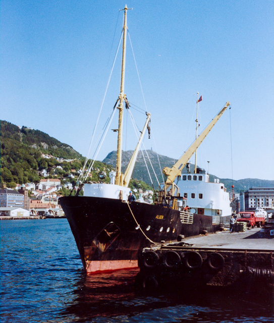 MS “Alden” laster i Bergen i 1982